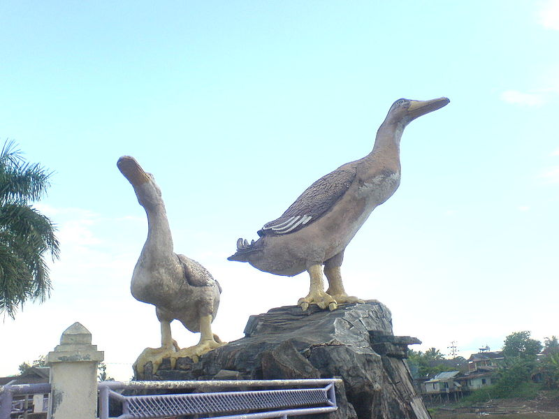 Monumen Itik Alabio, Amuntai, Hulu Sungai Utara, Indonesia